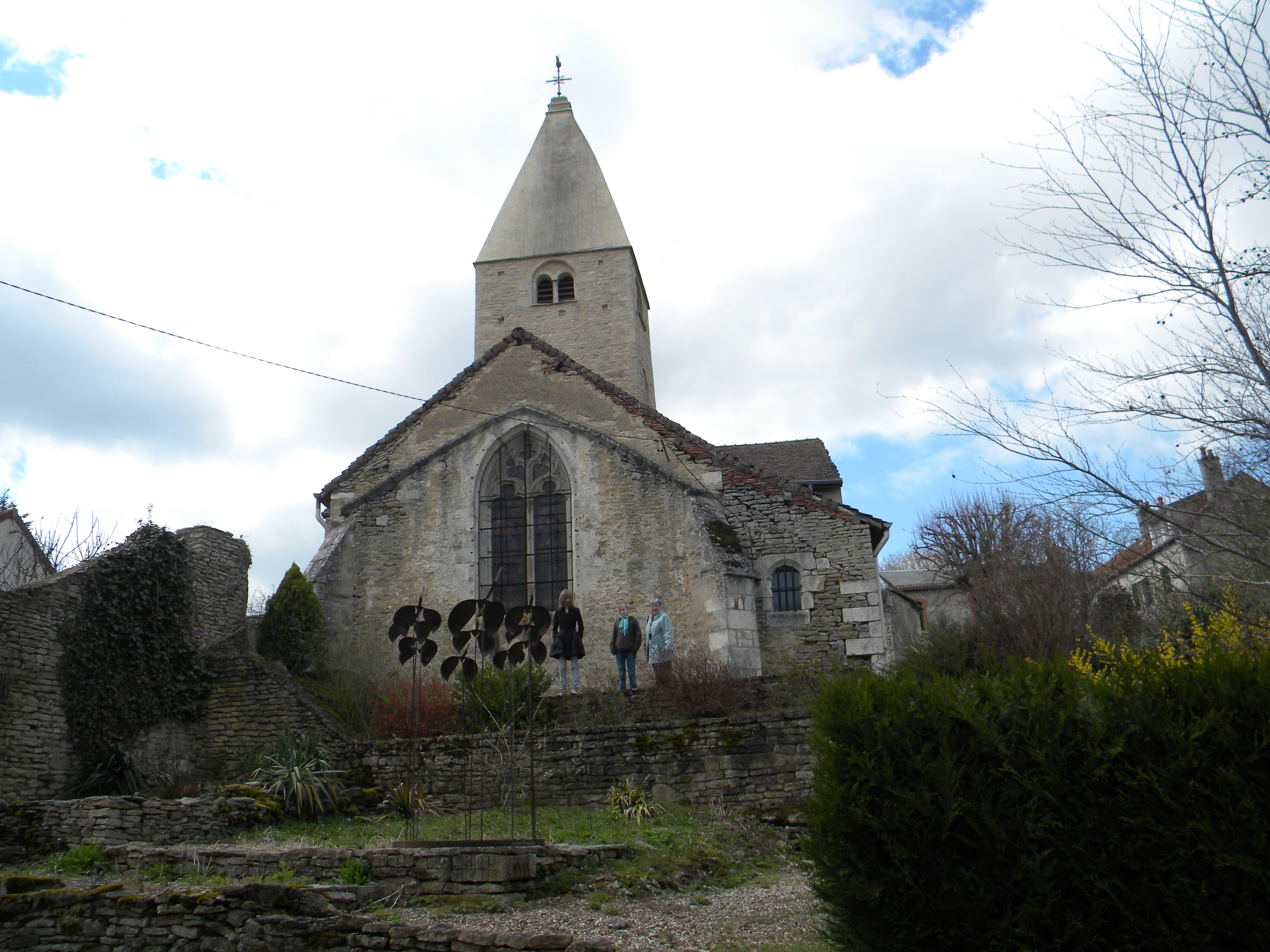 Preĝejo